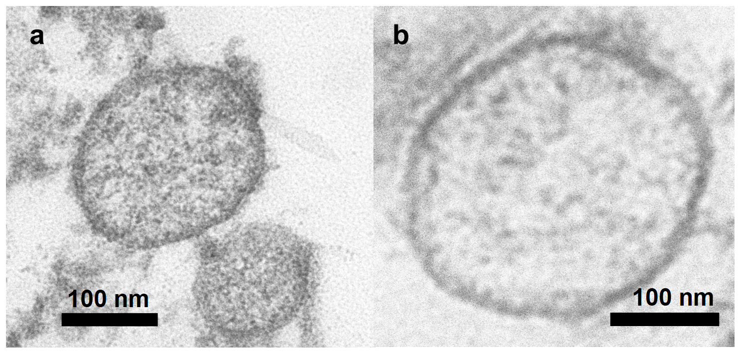 Figura 1. Microscopía electrónica de transmisión de microvesículas/exosomas purificados. A) Microvesículas/exosomas que muestran un aspecto denso a los electrones. B) Exosoma con aspecto lucente a los electrones. Cardiomiocitos murinos. Las microvesículas/exosomas se aislaron del medio de cultivo, mediante centrifugación diferencial y ultracentrifugación. La barra representa 100 nm. Microscopía electrónica de transmisión.